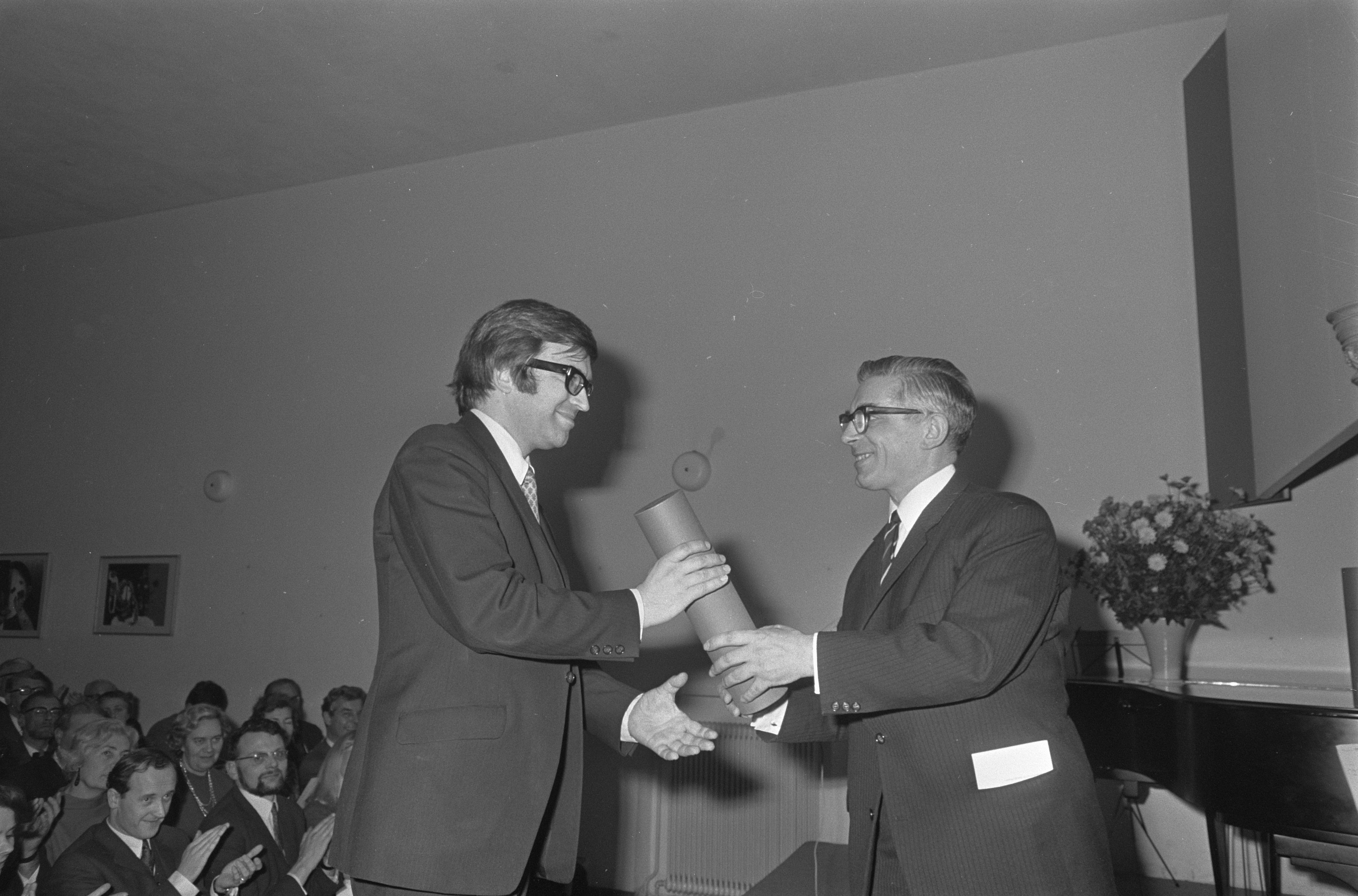 Collectie / Archief : Fotocollectie Anefo Reportage / Serie : [ onbekend ] Beschrijving : Kunstprijzen 1967 en 1968 van gemeente Amsterdam uitgerei de uitreikingen Datum : 24 januari 1969 Locatie : Amsterdam, Noord-Holland Trefwoorden : Uitreikingen, gemeenten, kunst, prijzen Fotograaf : Nijs, Jac. de / Anefo Auteursrechthebbende : Nationaal Archief Materiaalsoort : Negatief (zwart/wit) Nummer archiefinventaris : bekijk toegang 2.24.01.05 Bestanddeelnummer : 922-0366 Reacties Geplaatst door Amsterdammertje op 06 oktober 2015 - 19:31. Wethouder van Kunstzaken W. Polak overhandigd typograaf Will van Sambeek de oorkonde. H.N. Werkmanprijs 1967 (typografische prijs) Persoonsnamen: Polak, Wim; Sambeek, van, Will